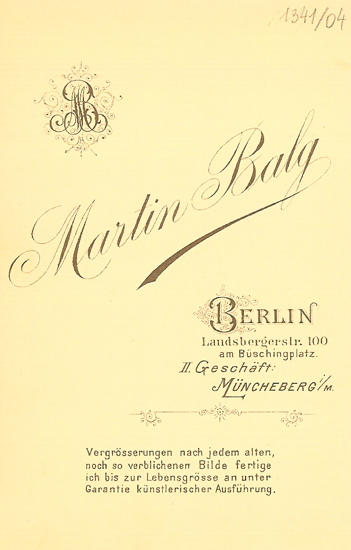 Revers eines Fotos von Martin Balg, als er ein Ateler in Berlin in der Landsberger Str. 100 (am Büschingplatz) und eine Filiale in Müncheberg i. M. hatte.